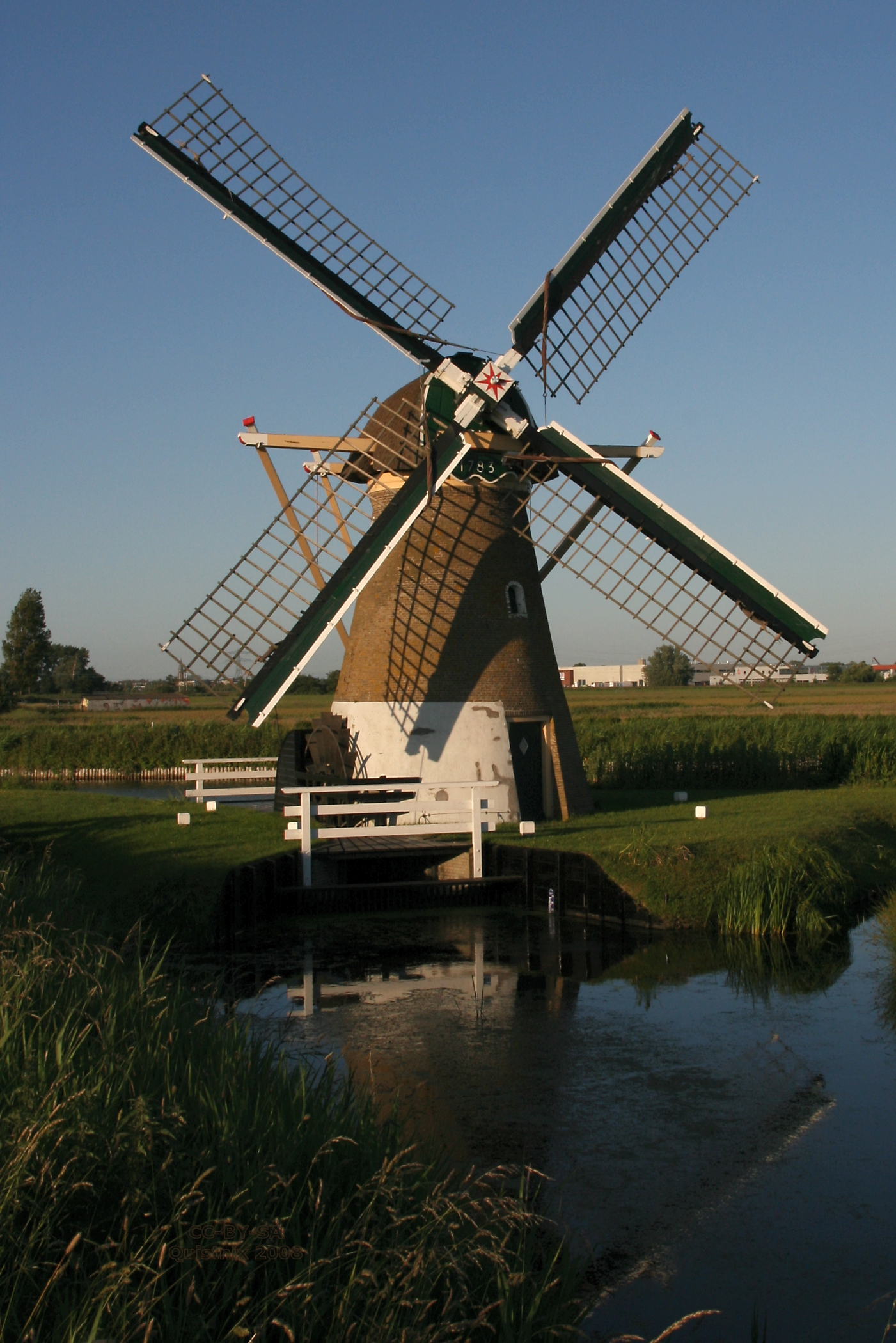 Voorhout: molen "Hoop Doet Leven"